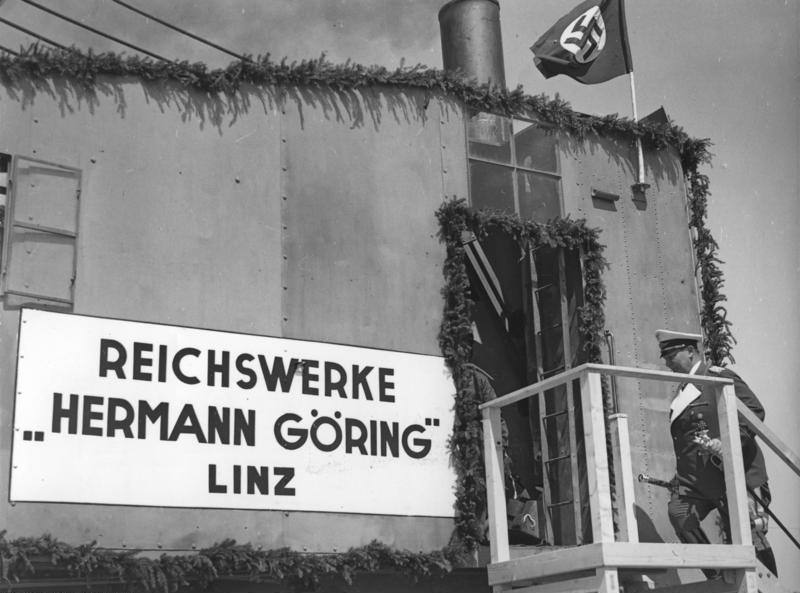 Linz, Reichswerke "Hermann Göring", Spatenstich Generalfeldmarschall Göring hat heute vormittag den ersten Spatenstich zu den in Linz geplanten Bauten der Reichswerke Hermann Göring getan. Feldmarschall Göring begibt sich in den Bagger, wo er den Hebel in Bewegung setzte. Abgebildete Personen: Göring, Hermann: Reichsmarschall, Oberbefehlshaber der Luftwaffe, Ministerpräsident von Preußen, Deutschland